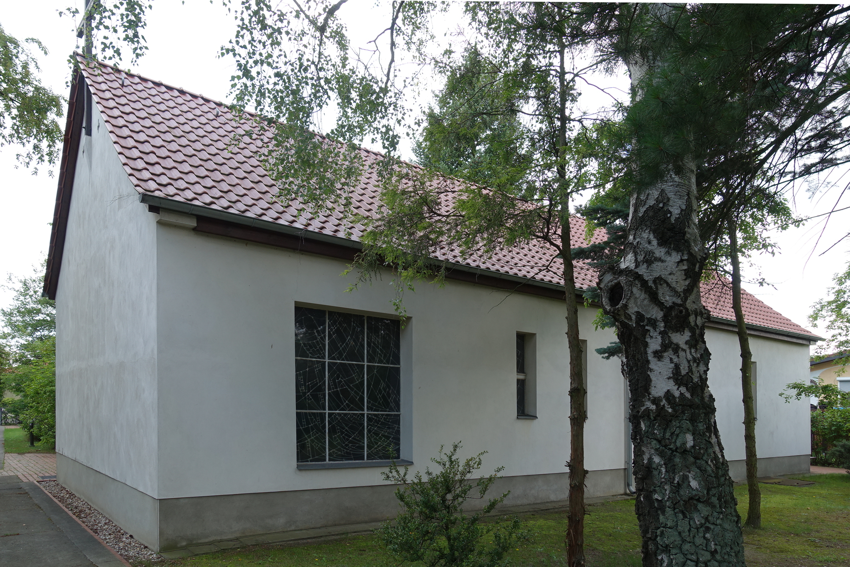 Die Fensterseite des Kirchenschiffs